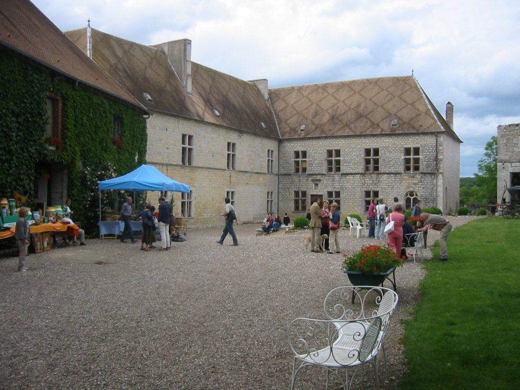 Chateau de la Roche à Rigney dans le Doubs en Franche-Comté - France